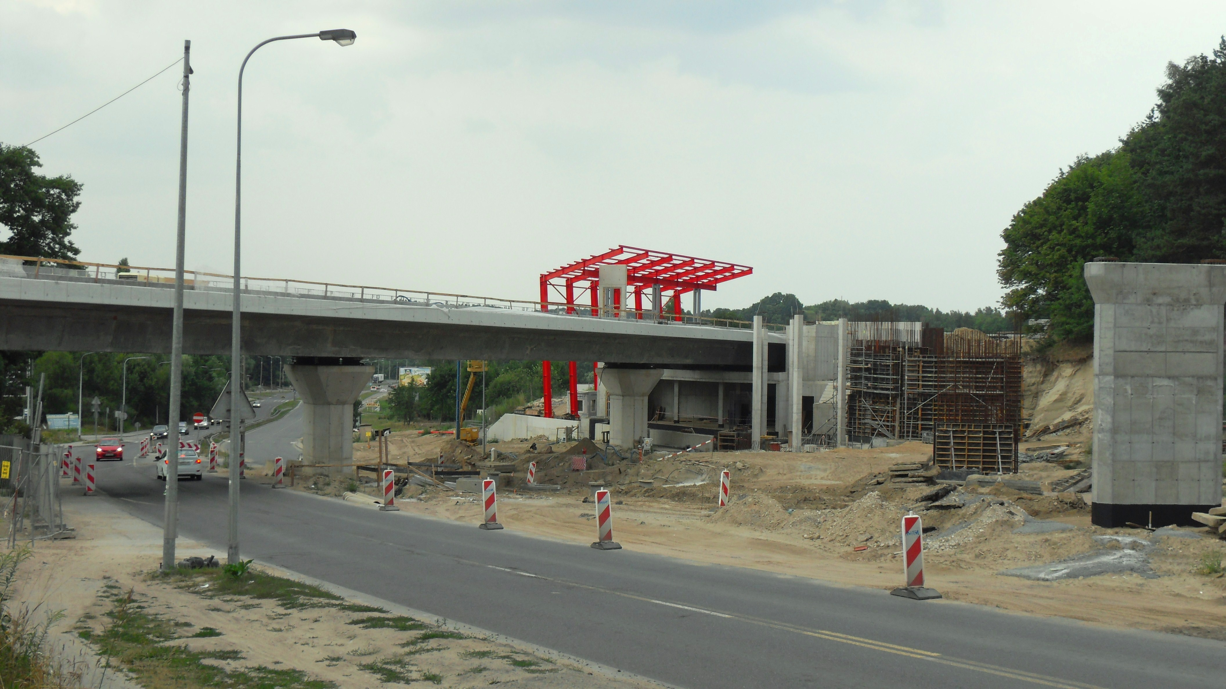 Przystanek Pomorskiej Kolei Metropolitalnej (PKM) Gdańsk Brętowo w budowie.